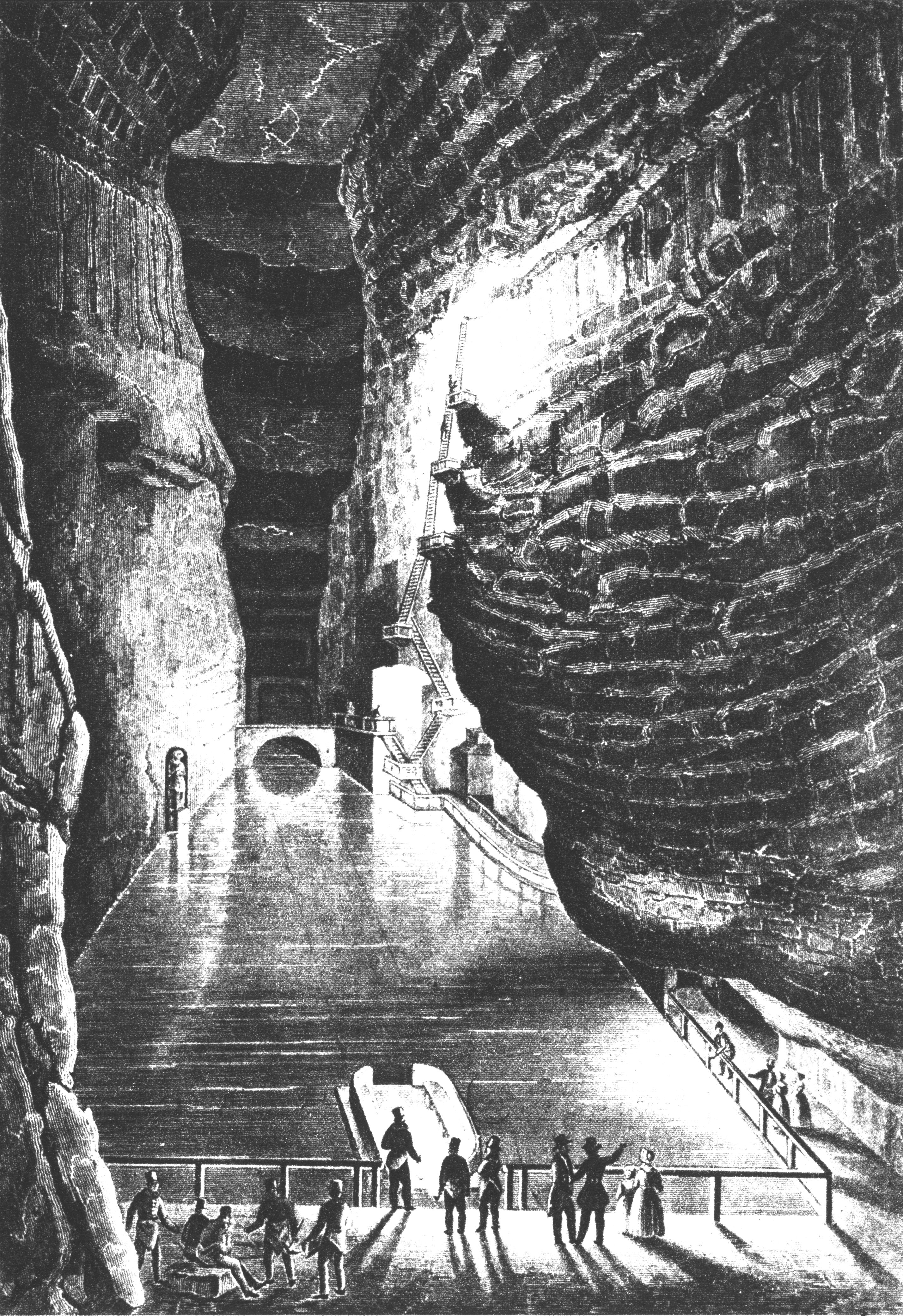 Chamber "Przykos" - Salt mines, Wieliczka, Poland.